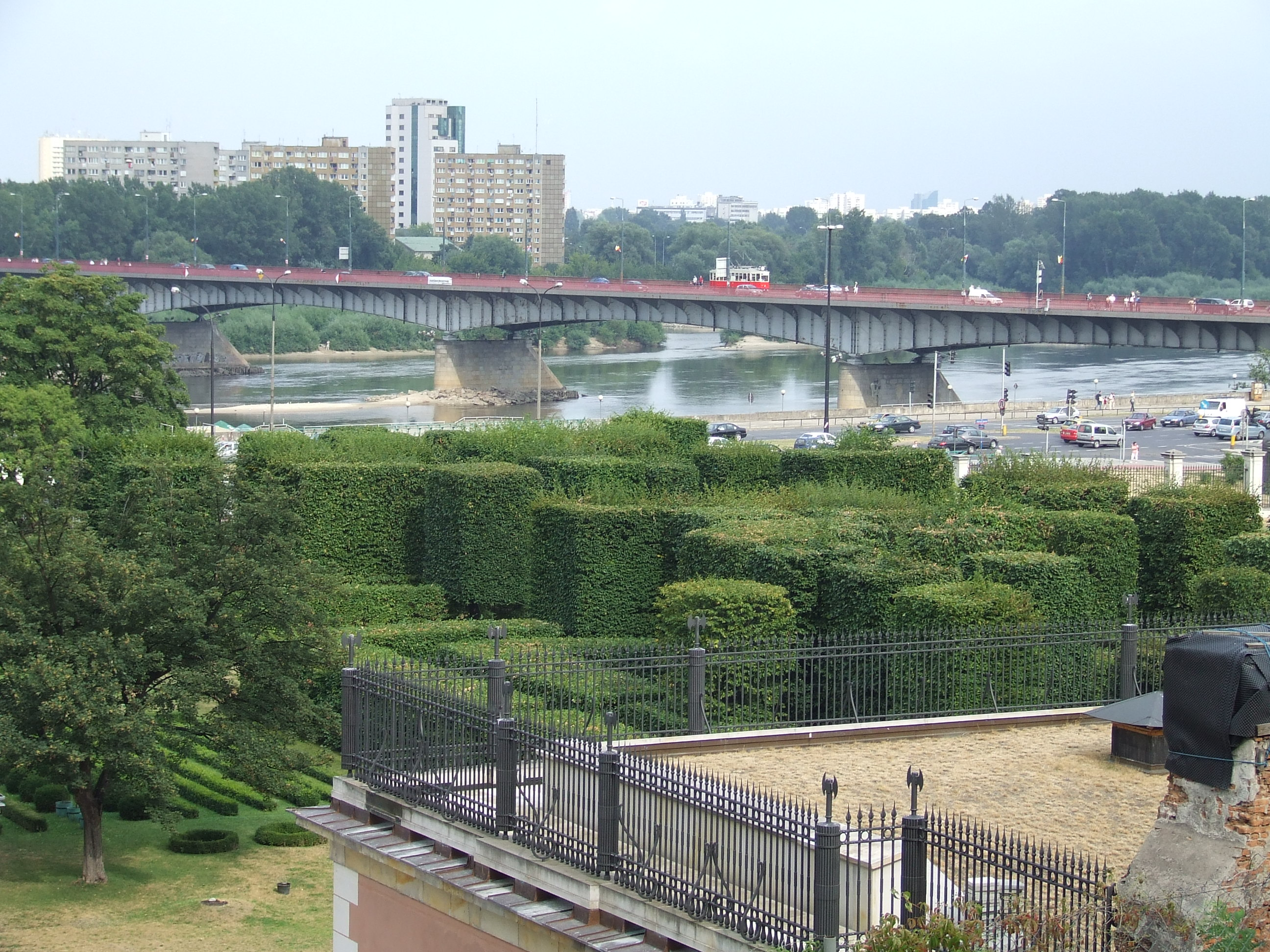 Most Śląsko-Dąbrowski, Warszawa, widok z tarasów Zamku Królewskiego, pośrodku mostu zabytkowy tramwaj